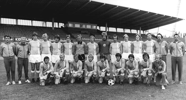 ADN-ZB Sindermann 26.7.78 Rostock: Die Fußball-Oberligamannschaft des FC Hansa Rostock. Stehend von links: Cheftrainer Helmut Hergesell, Trainer Rudi Schneider, Jörg Seering, Ronald Adam, Rüdiger Kaschke, Jürgen Utess, Dieter Schneider, Gerd Kische, Karl-Heinz Aul, Peter Sykora, Eckhard Brackenwagen, Uwe Block, Rainer Jarohs, Mannschaftsarzt Dr. Rainer Müller und Mannschaftsleiter Klaus Decker. Davor von links: Jürgen Decker, Olaf Spandol, Hans-Joachim Wandke, Bernd Köhler, Axel Schulz, Eckhard Märzke, Dietrich Kehl, Michael Mischinger und Physiotherapeut Günter Blum.